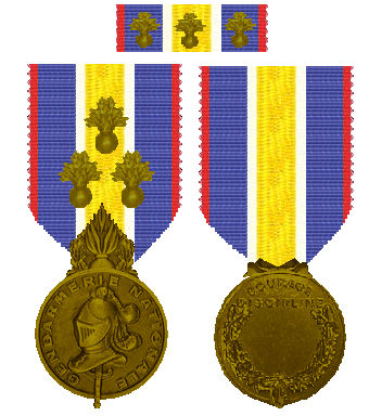 Médaille de la Gendarmerie nationale